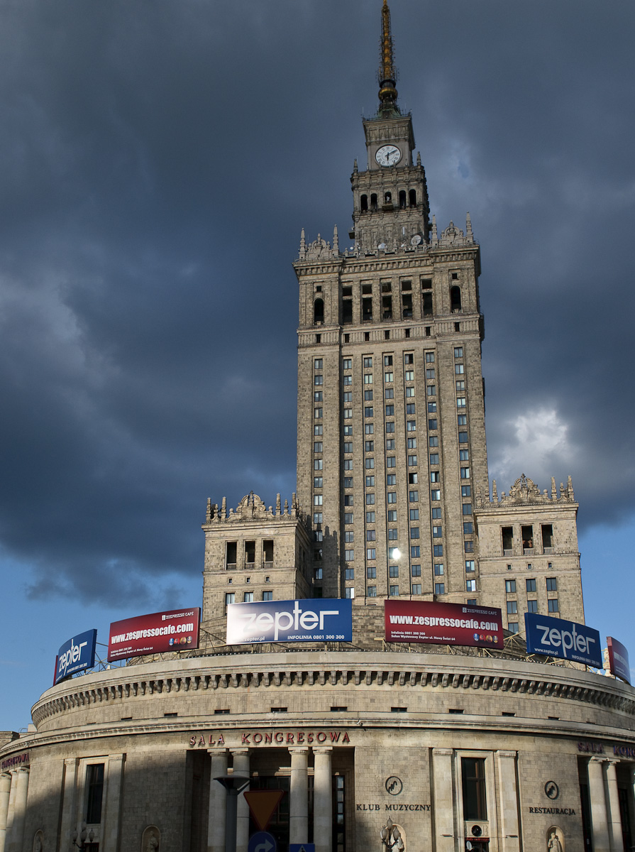 Pałac Kultury i Sztuki, Warsaw Poland